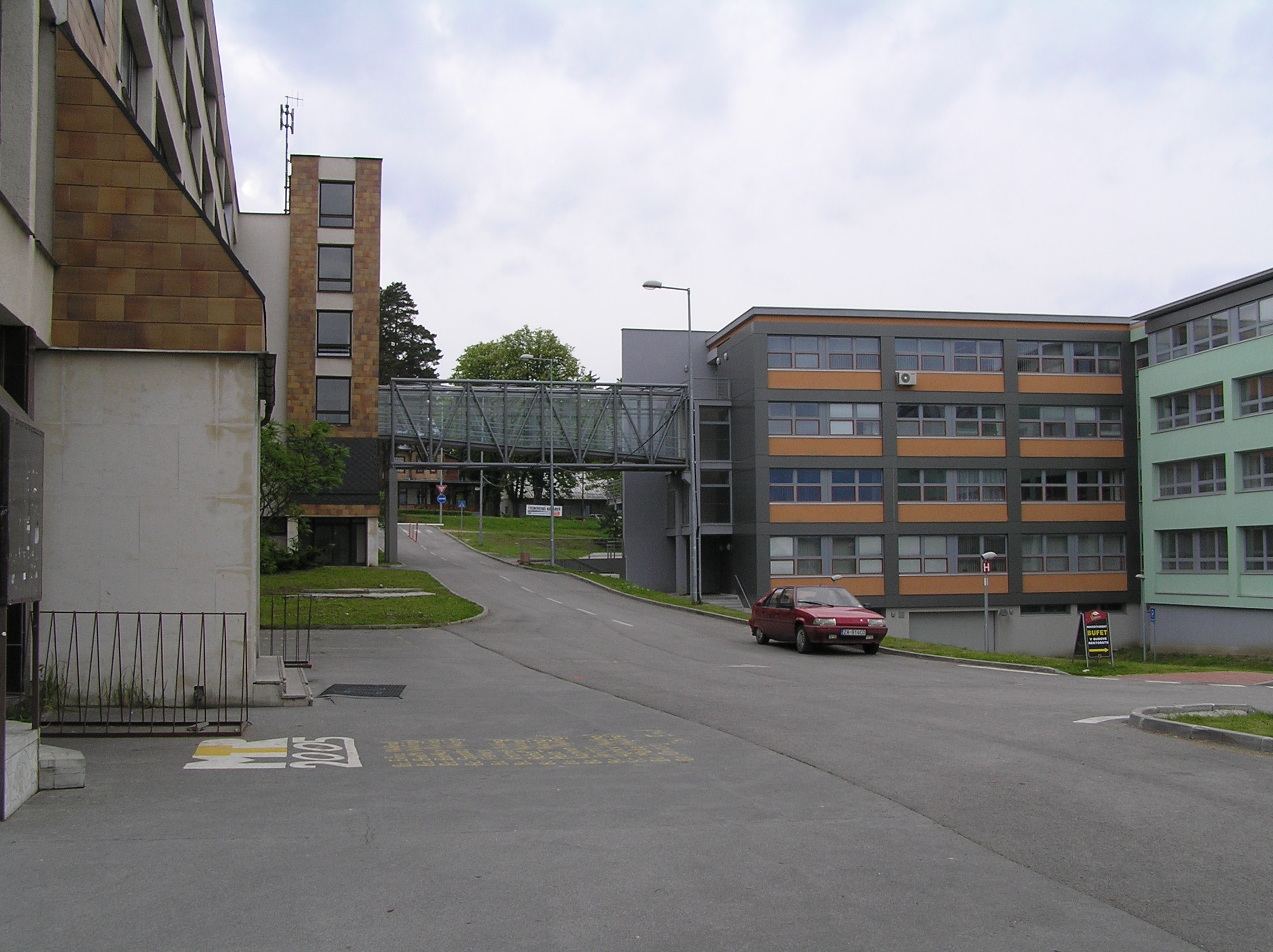 Žilina, pohľad z Veľkého dielu: Žilinská univerzita, nová budova rektorátu